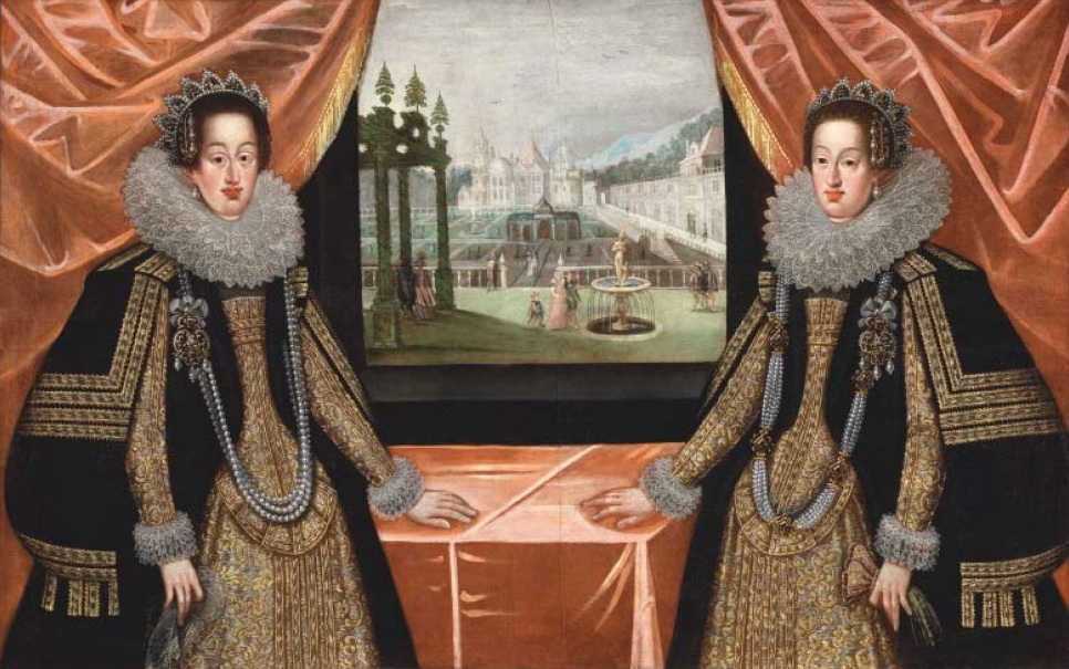 Maria Anna und Cäcilia Renata von Habsburg, Töchter Kaiser Ferdinands II.